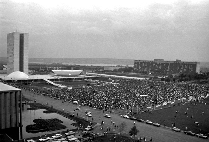 Manifestantes no gramado da Esplanada dos Ministérios pedem o impeachment do então presidente Fernando Collor de Mello. Setembro de 1992. Fotógrafo: Célio Azevedo.